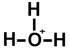 Formule développée de l'ion hydronium (oxonium).